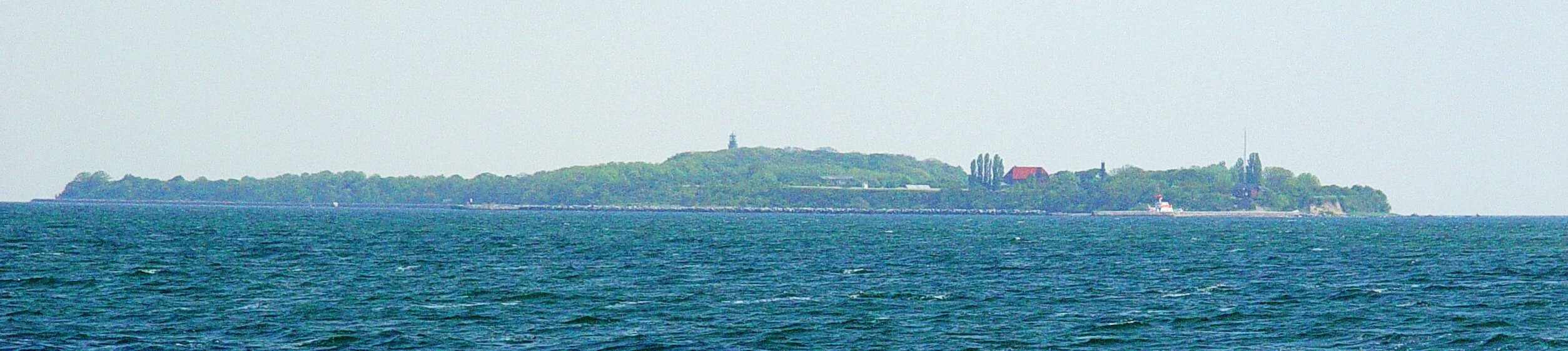 Die Insel Greifswalder Oie.